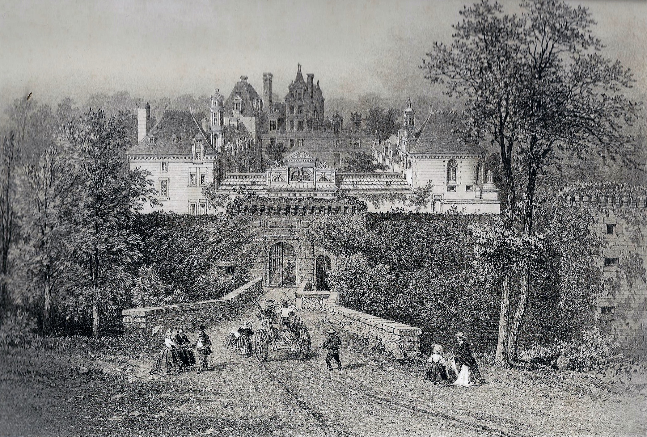 "Château de Kerjean près de Plouzévédé" ( (dessin d'Eugène Cicéri, publié dans Félix Benoist, "La Bretagne contemporaine", tome "Finistère", 1867).